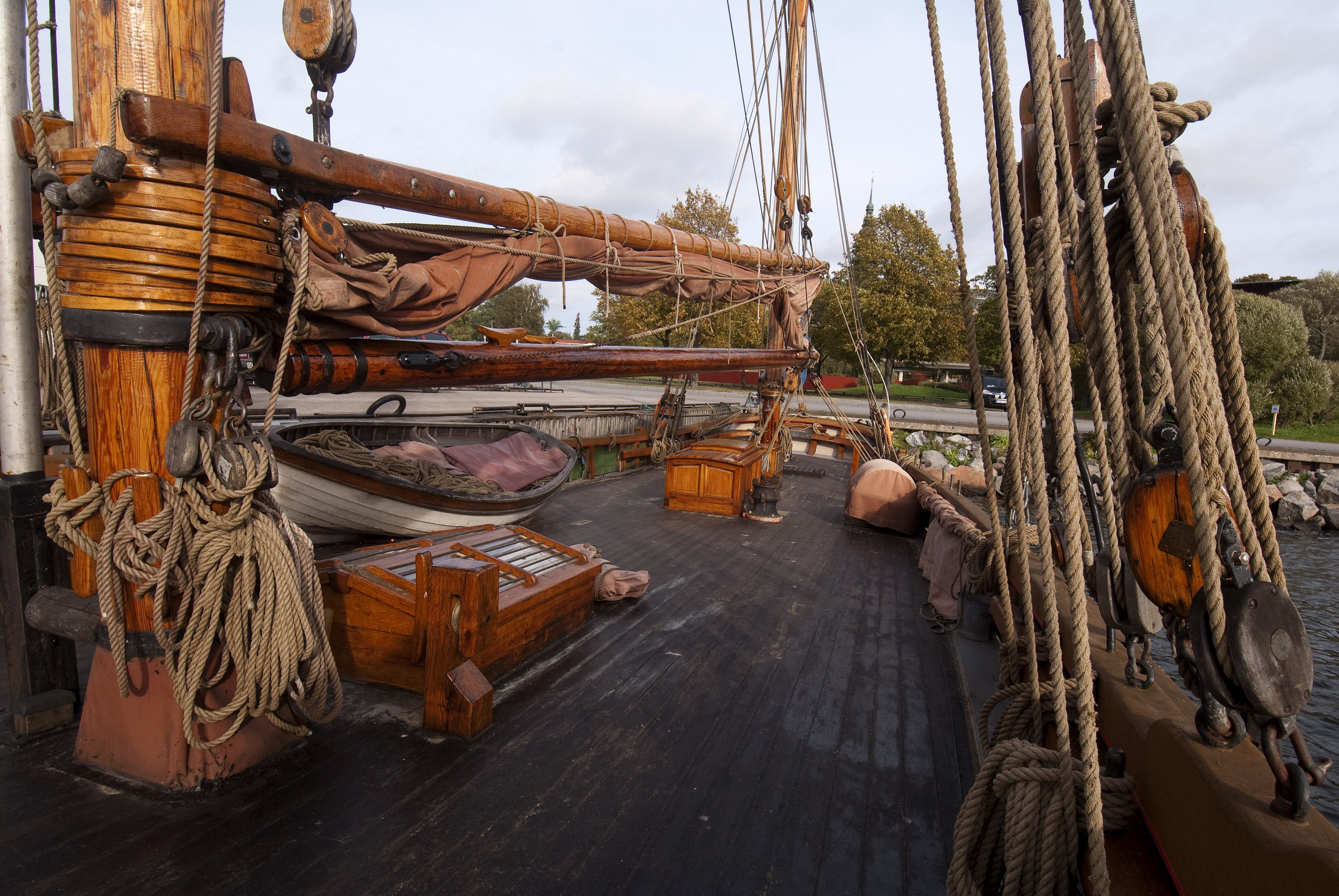 Det K-märkta fartyget Deodar vid Djurgården, Stockholm.